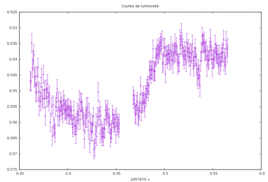 Courbe de luminosité montrant le passage d'une planète devant son étoile